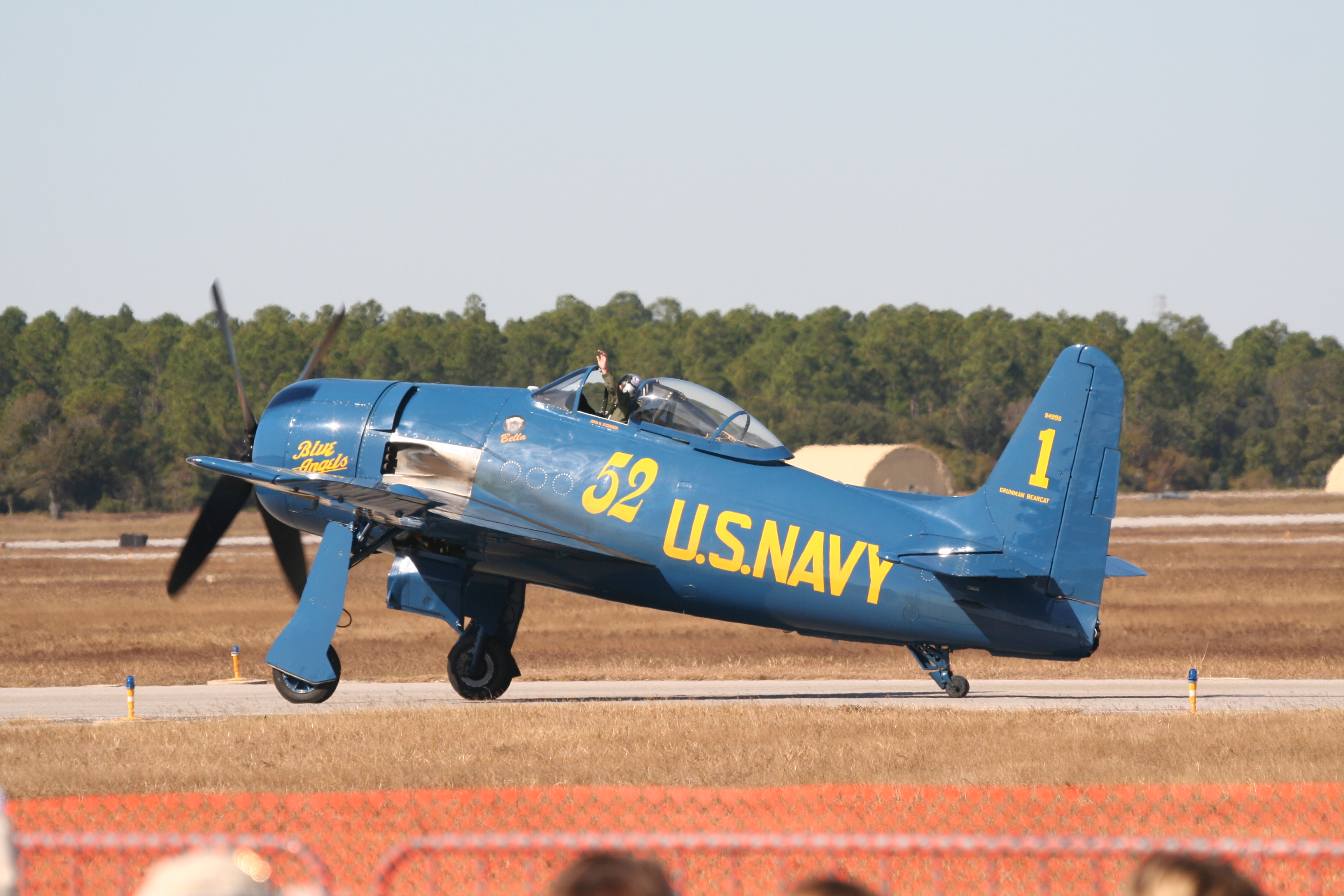 NAS Pensacola Air Show 2011 Privado Grumman F8F-2 Bearcat N68RW / 94996/1 D.1162 Con los colores de los Blue Angels de la temporada 1947-1948.